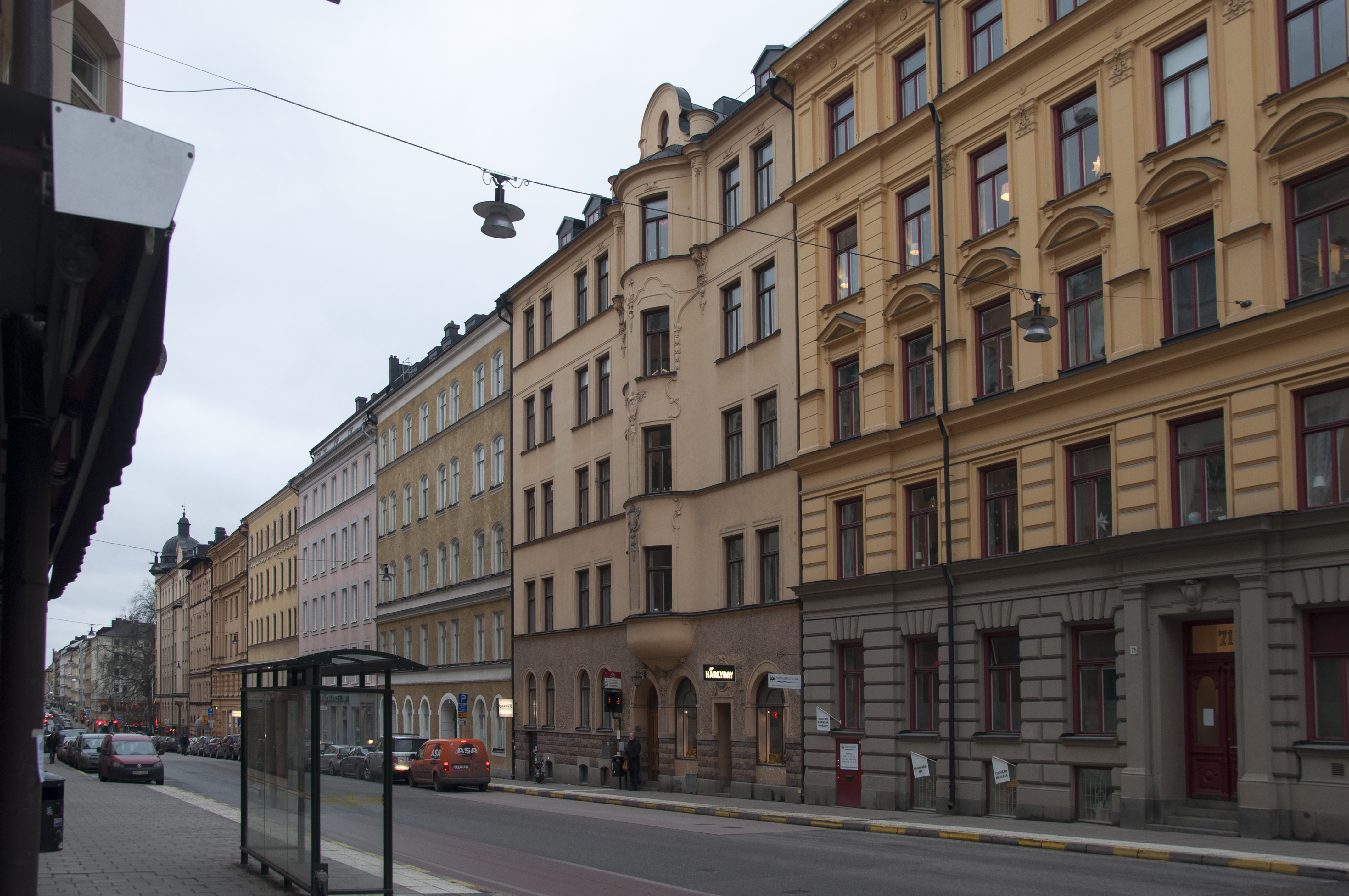 Kvarteret Blåklinten utmed Upplandsgatan